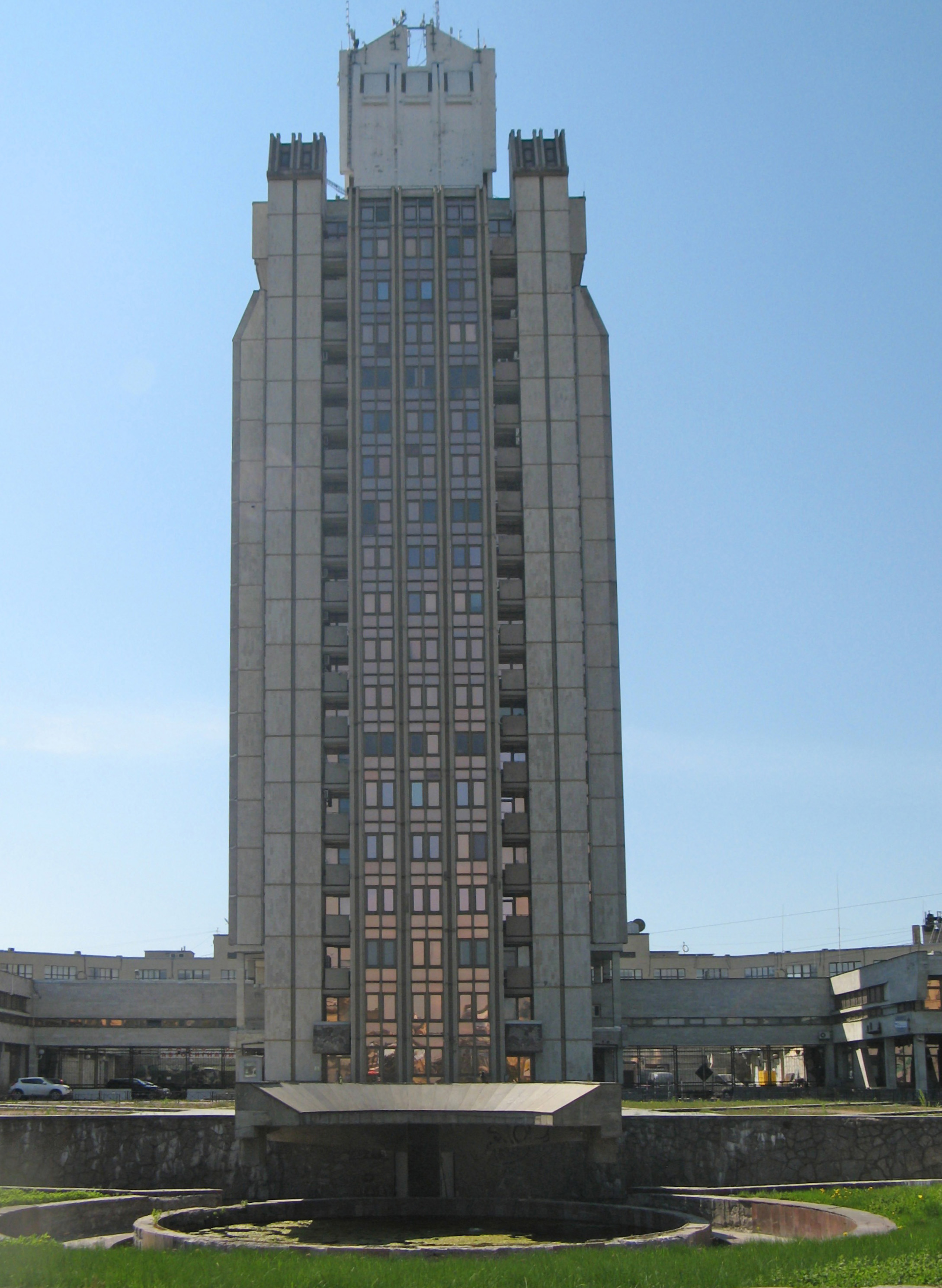 Санкт-Петербург, пл. Академика Климова